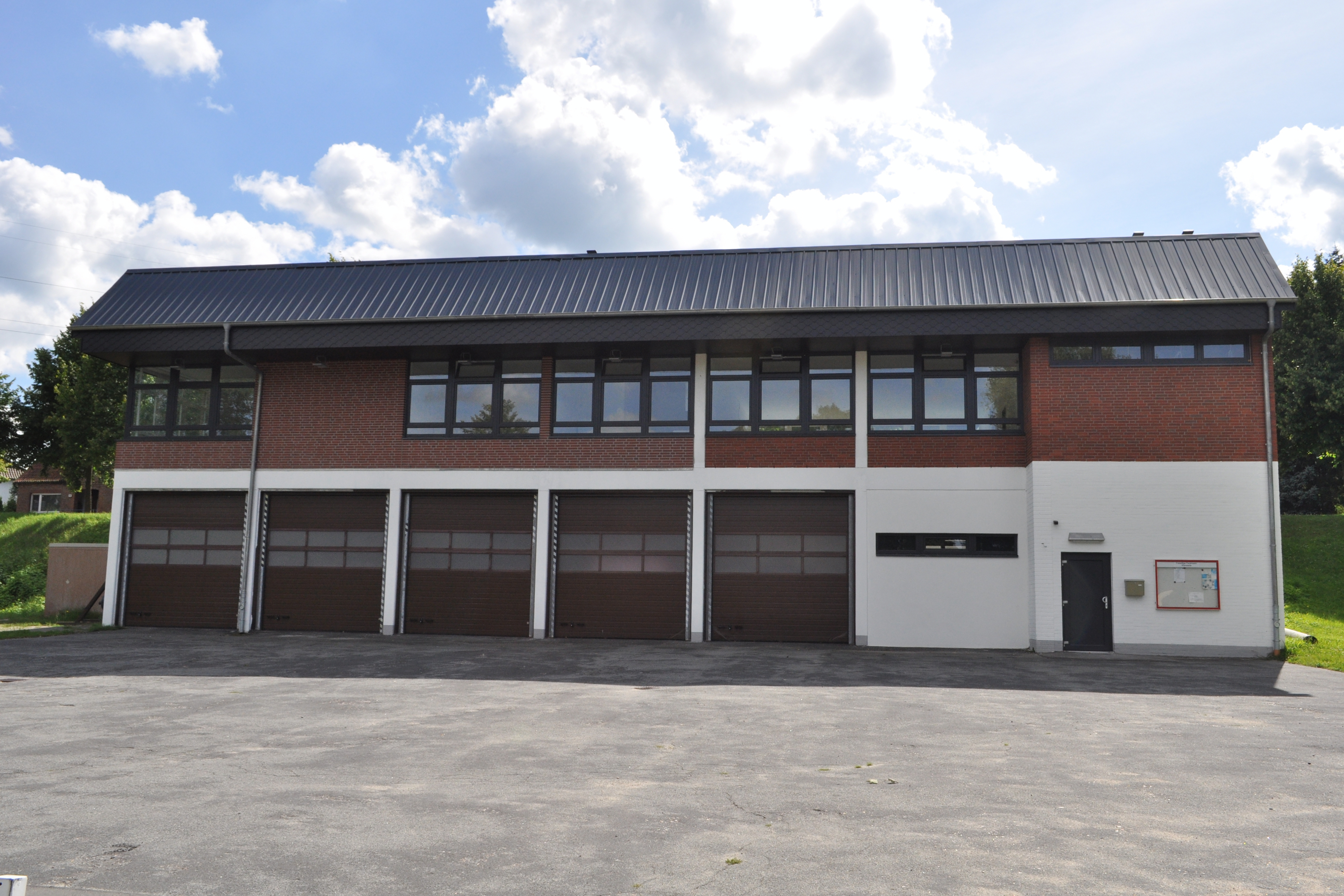 Gebäude der Freiwilligen Feuerwehr Warstade in Hemmoor.